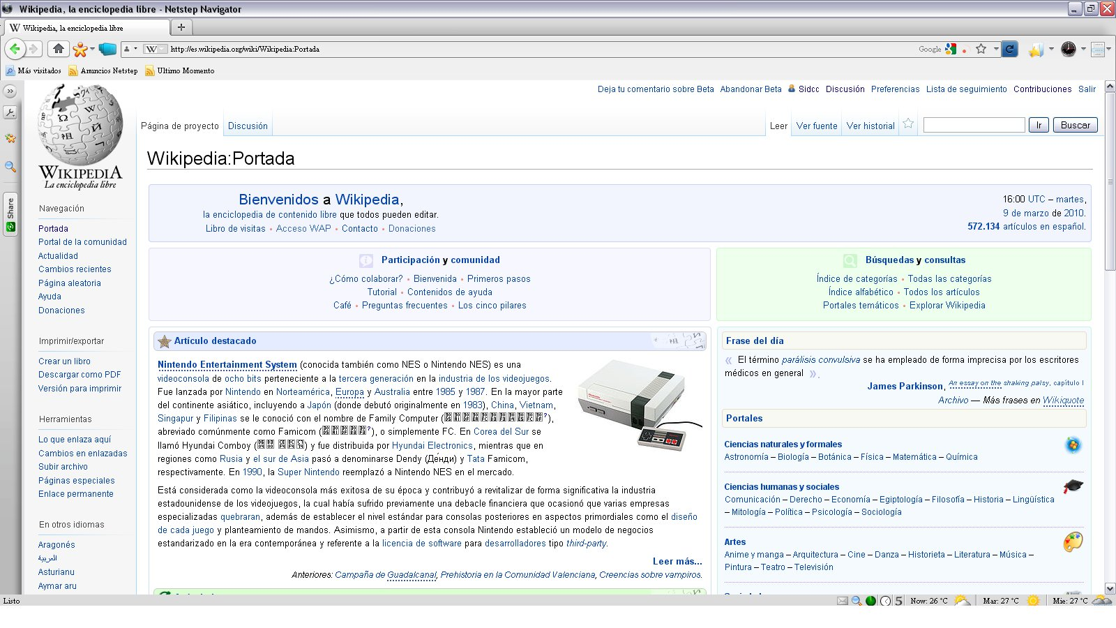 Ventana de Netstep en Windows XP